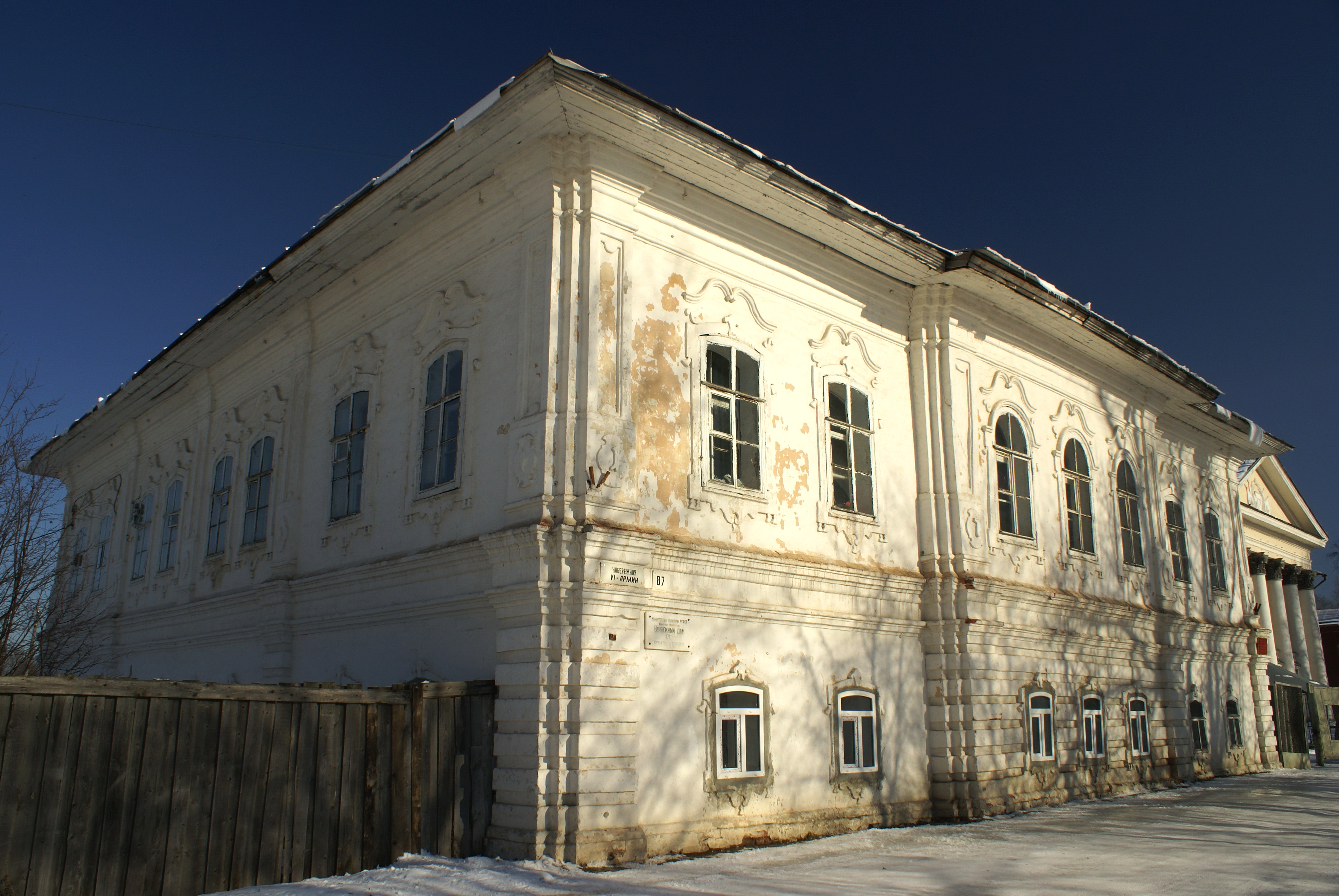 Ночлежный дом: набережная VI армии, 87, Вологда, Вологодская область